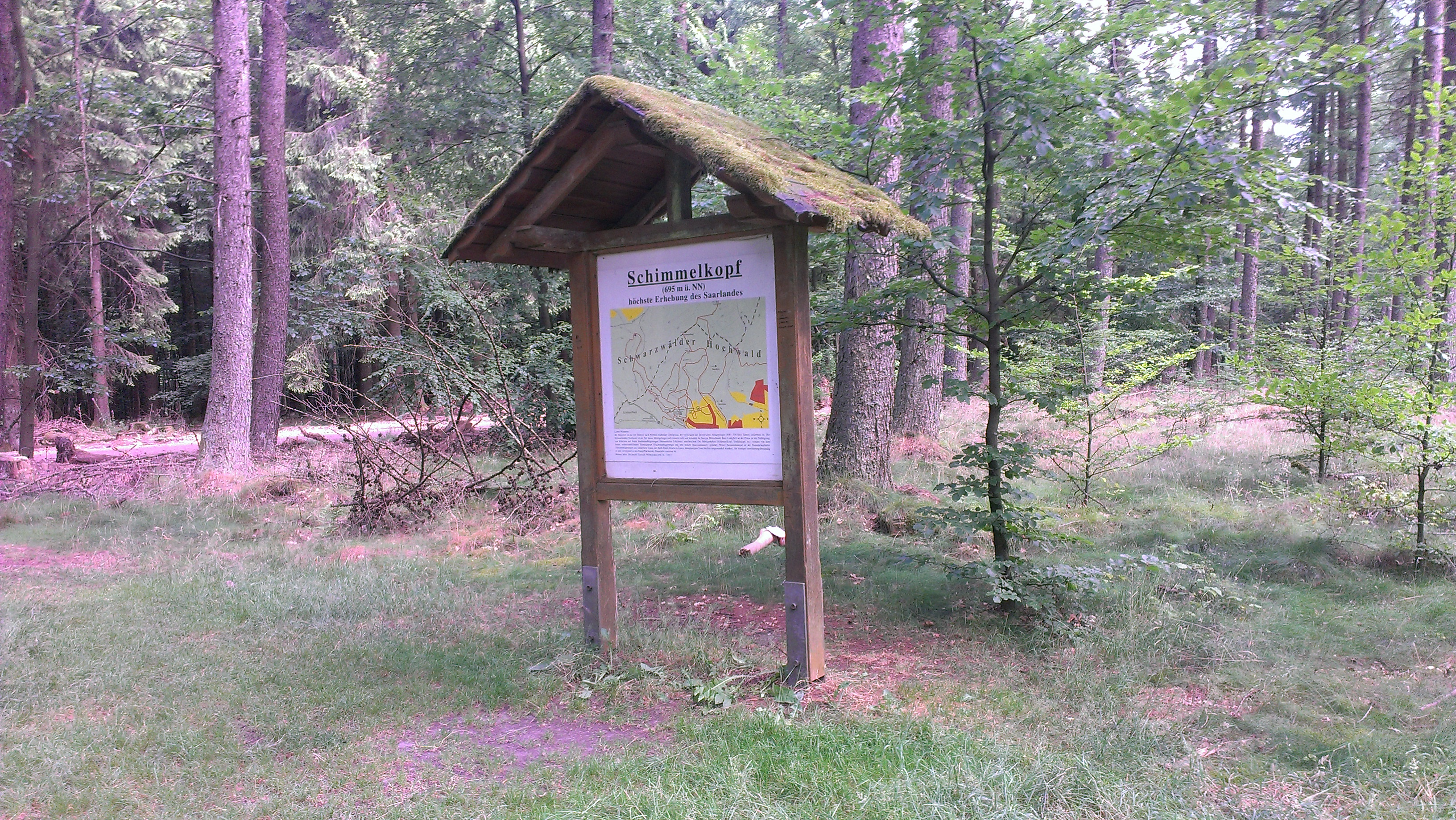 Gipfelfoto von Schimmelkopf